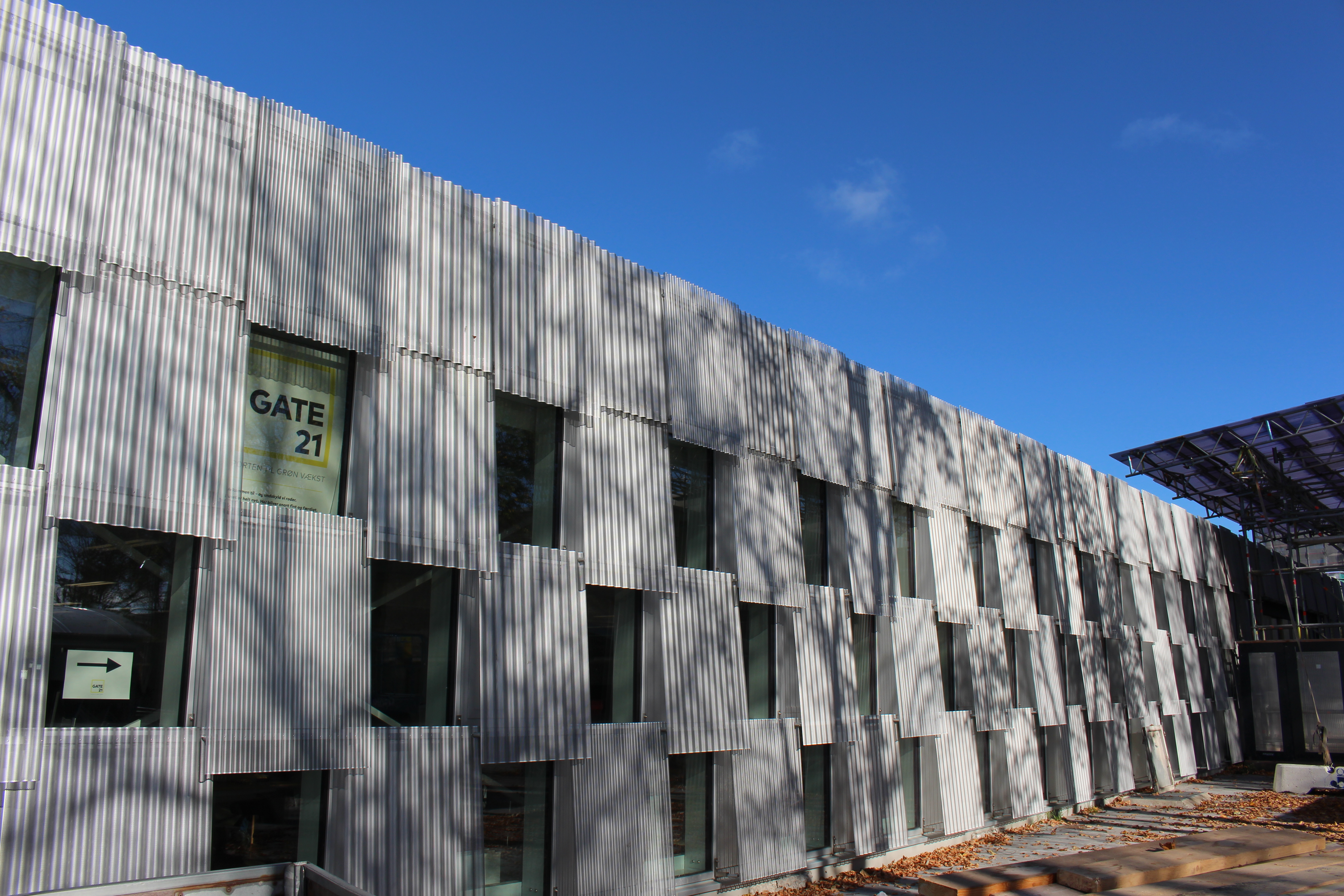 Gate 21 i Albertslund